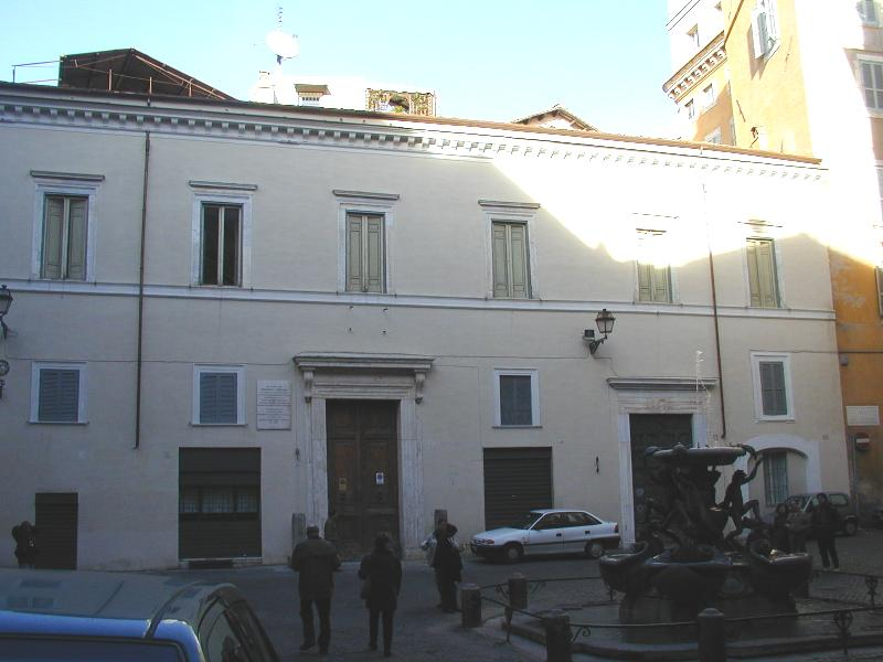 Roma, palazzetto Mattei a S. Angelo. Facciata sulla piazza e fontana delle Tartarughe.